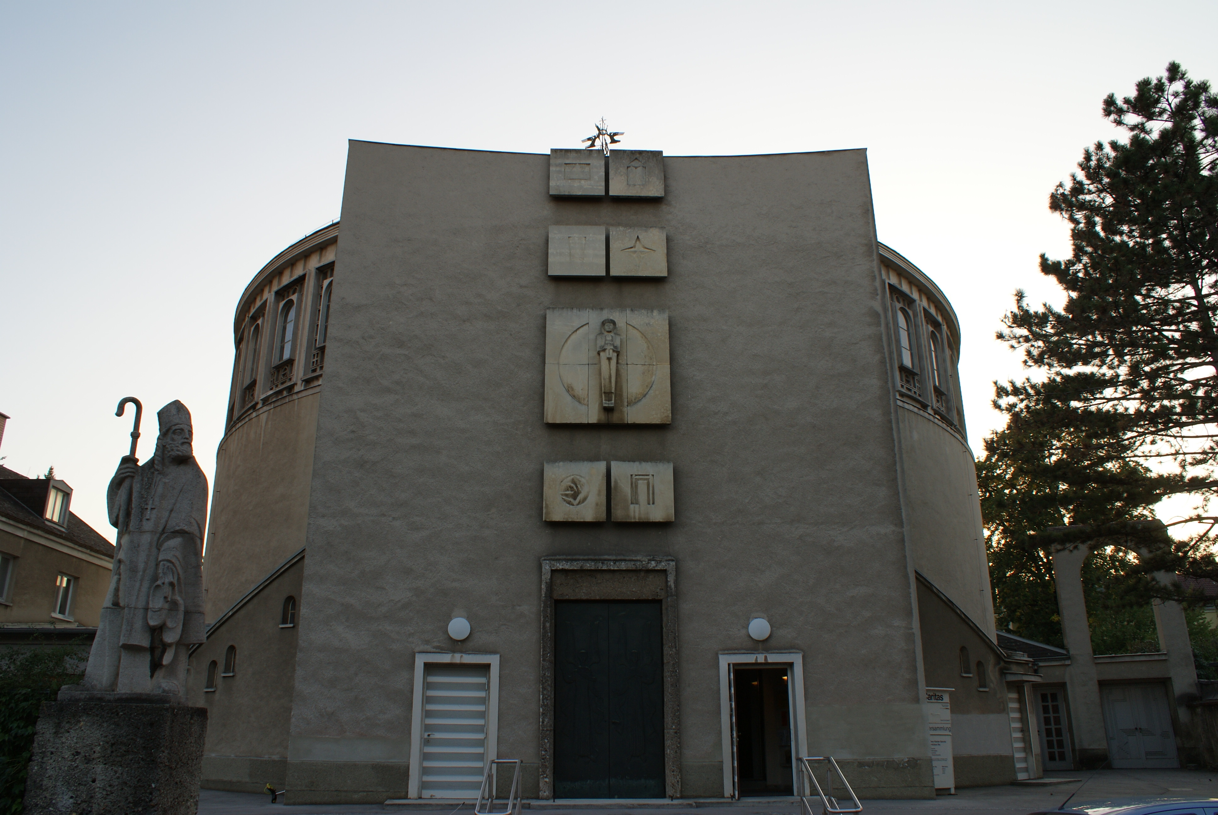 Portalwand der Pfarrkirche Liesing gestaltet von Josef Pillhofer. Zeigt Symbole zur Lauretanischen Litanei.